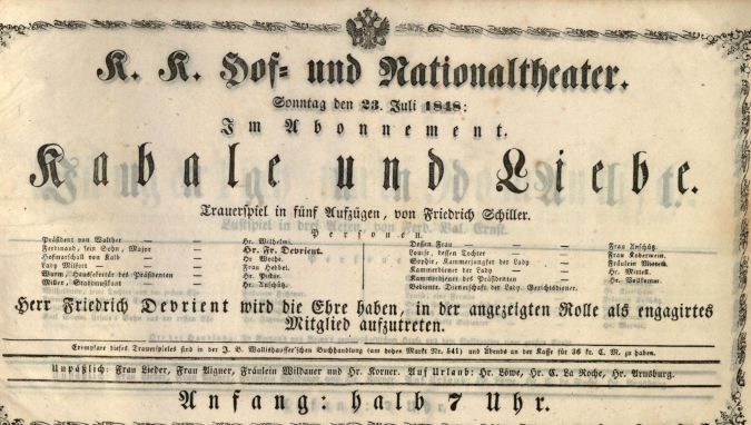 Theaterzettel des Hof- und Nationaltheaters Wien vom 23.07.1848: Erstengagement des Schaupielers Friedrich Devrient.